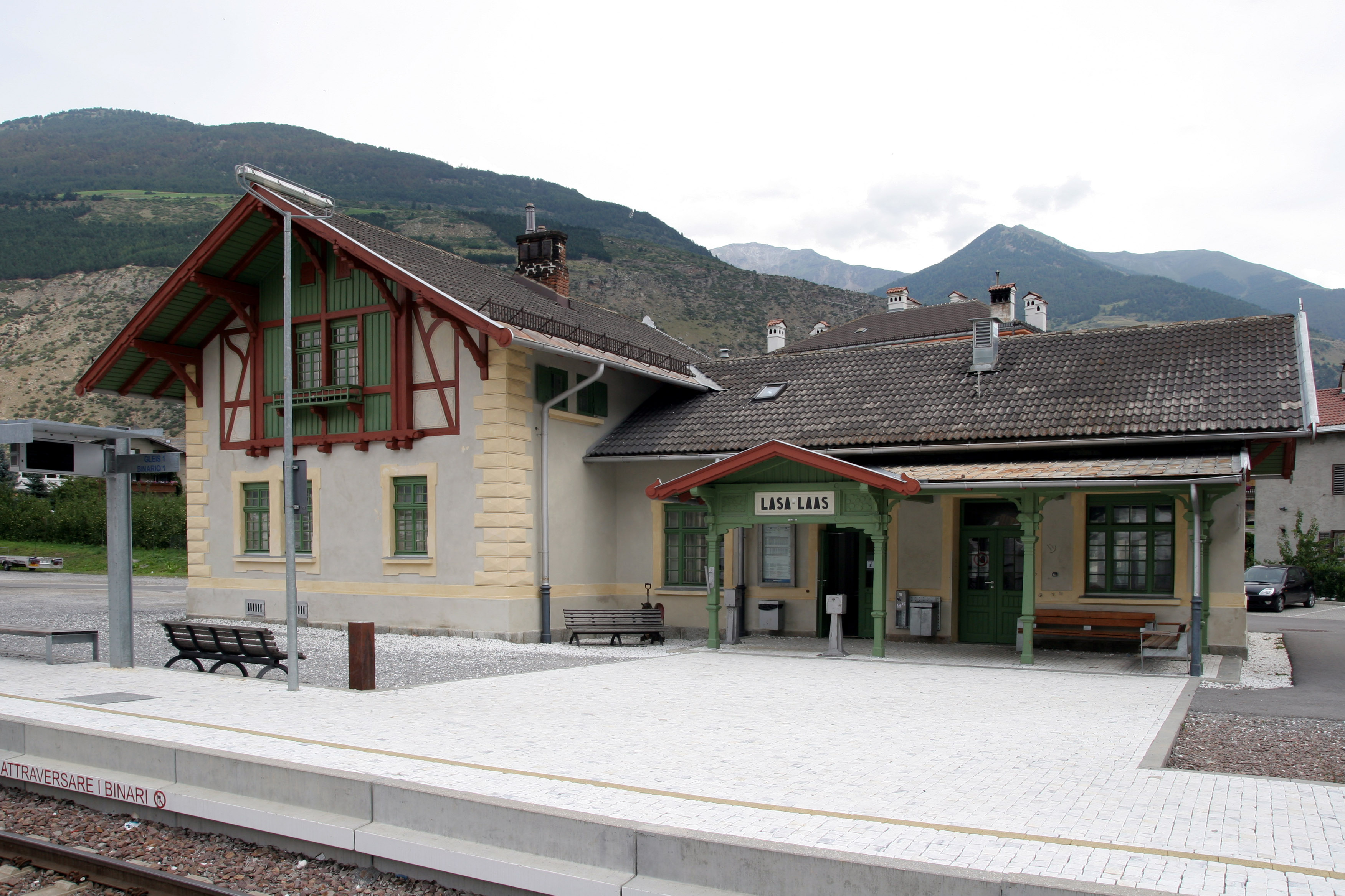 Der Bahnhof der Vinschger Bahn in Laas (Südtirol).